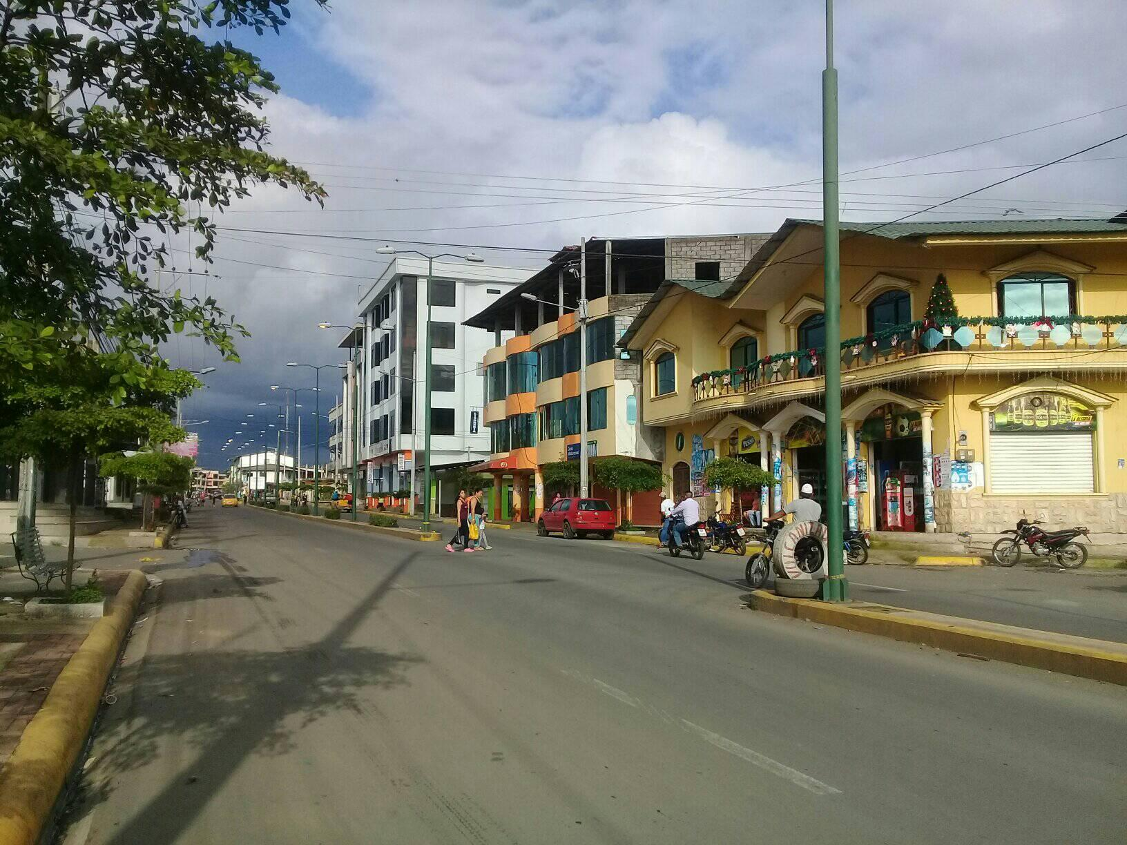 Avenida de Quinsaloma.